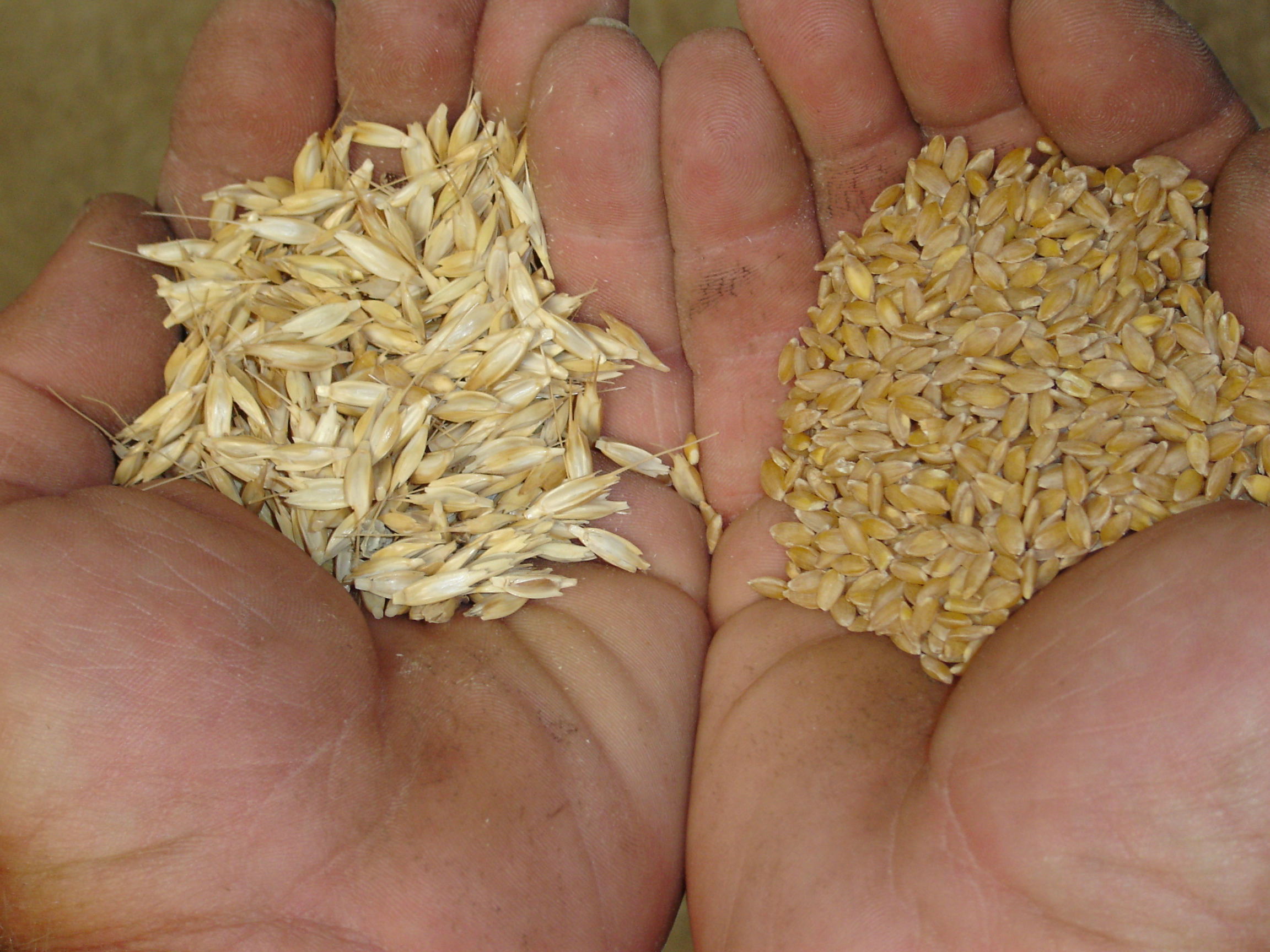 Bruts de récolte de Petit Epeautre de Haute Provence et grains décortiqués de sa bale